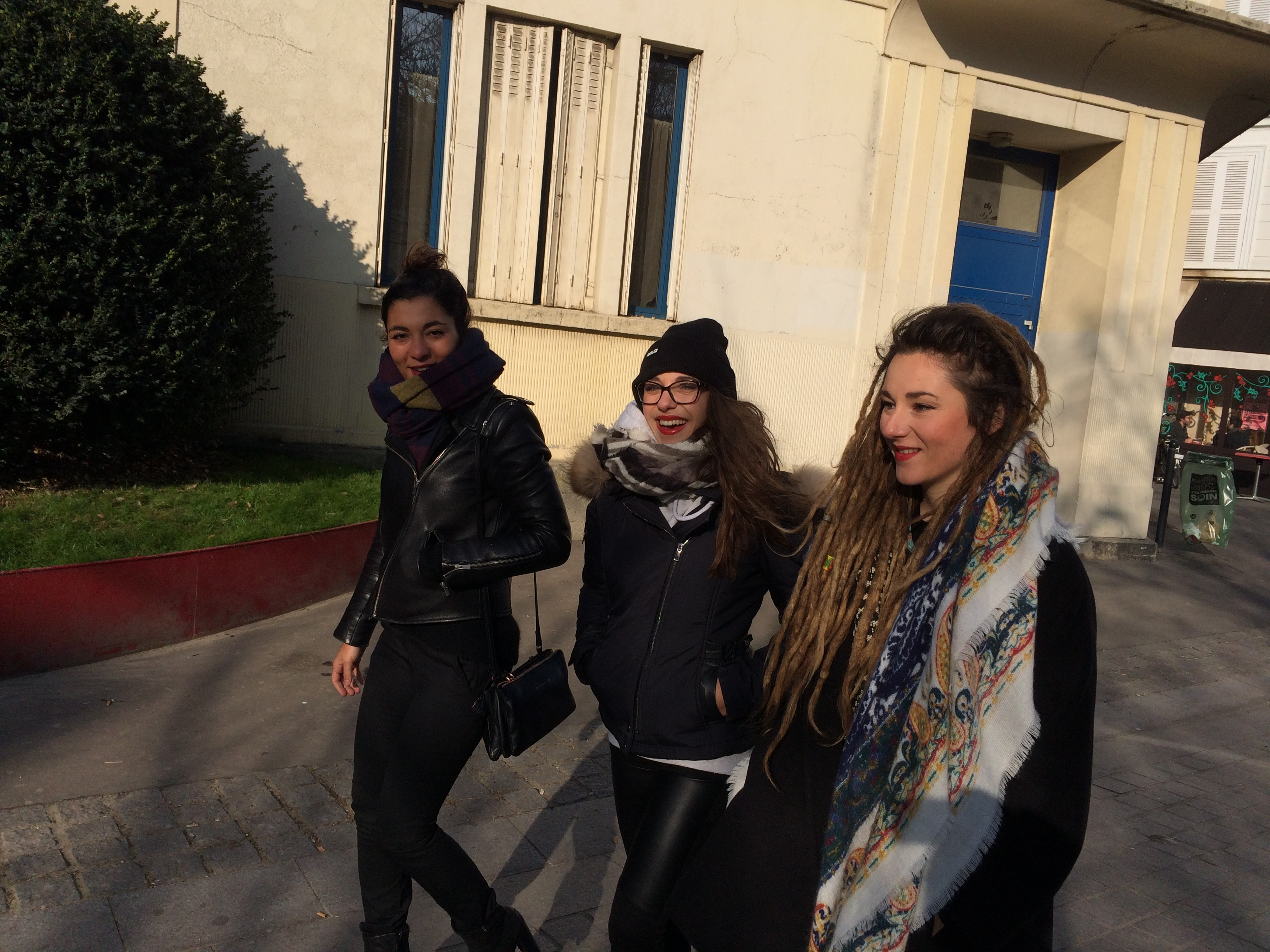 Les membre du groupe musical L.E.J. dans les rues de Saint-Denis